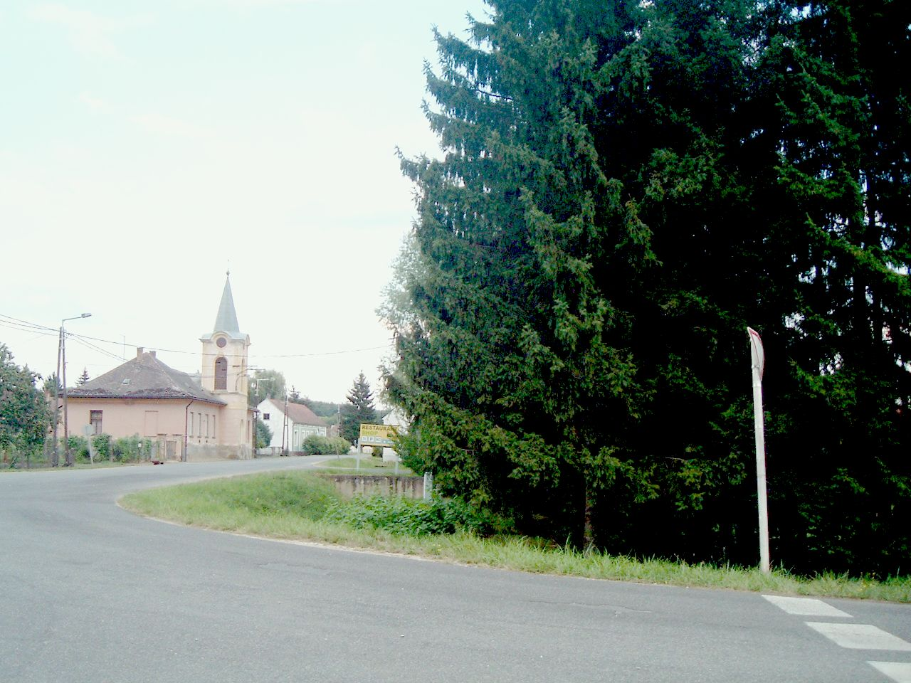 Rábafüzes